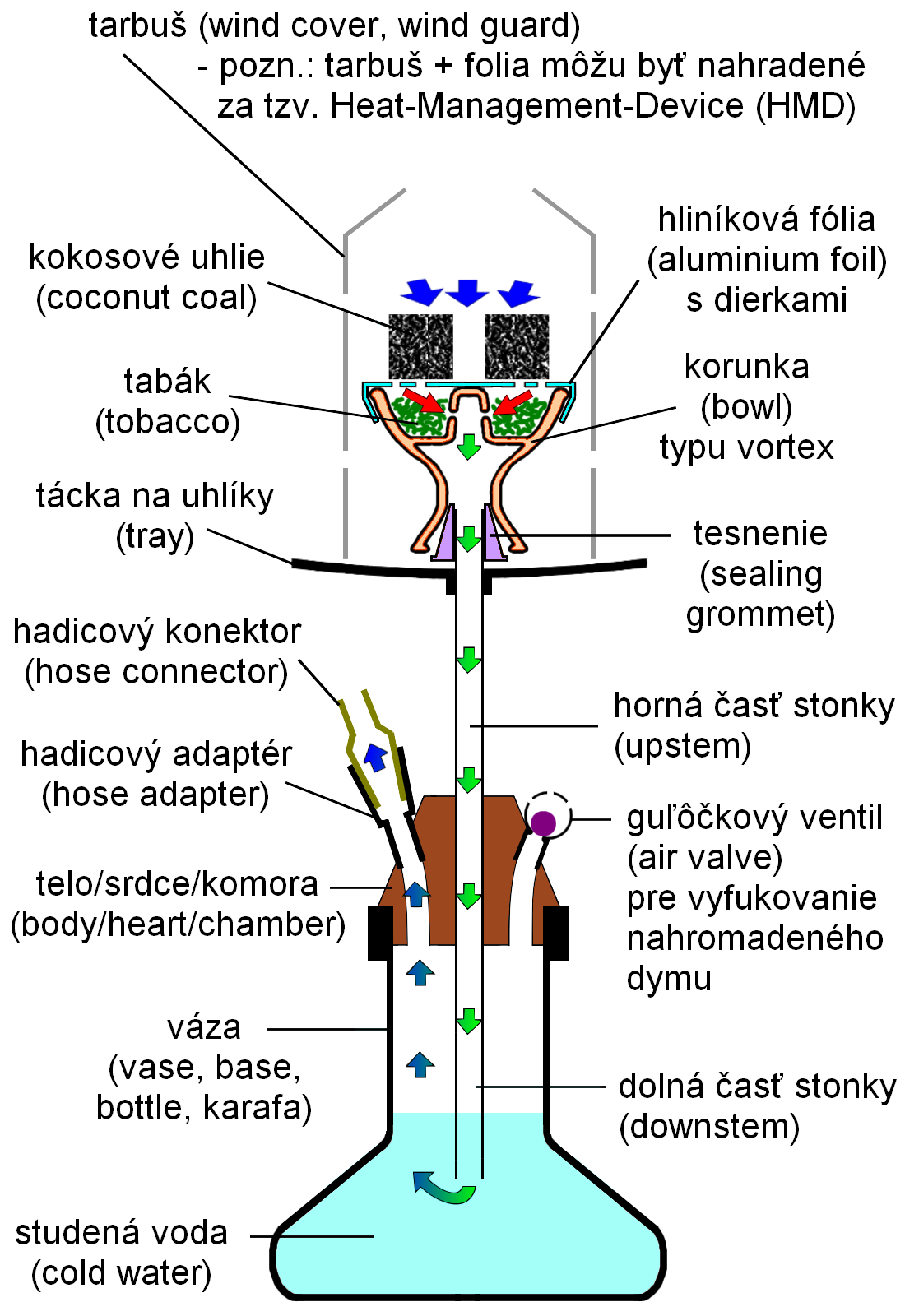 časti vodnej fajky / hookah parts